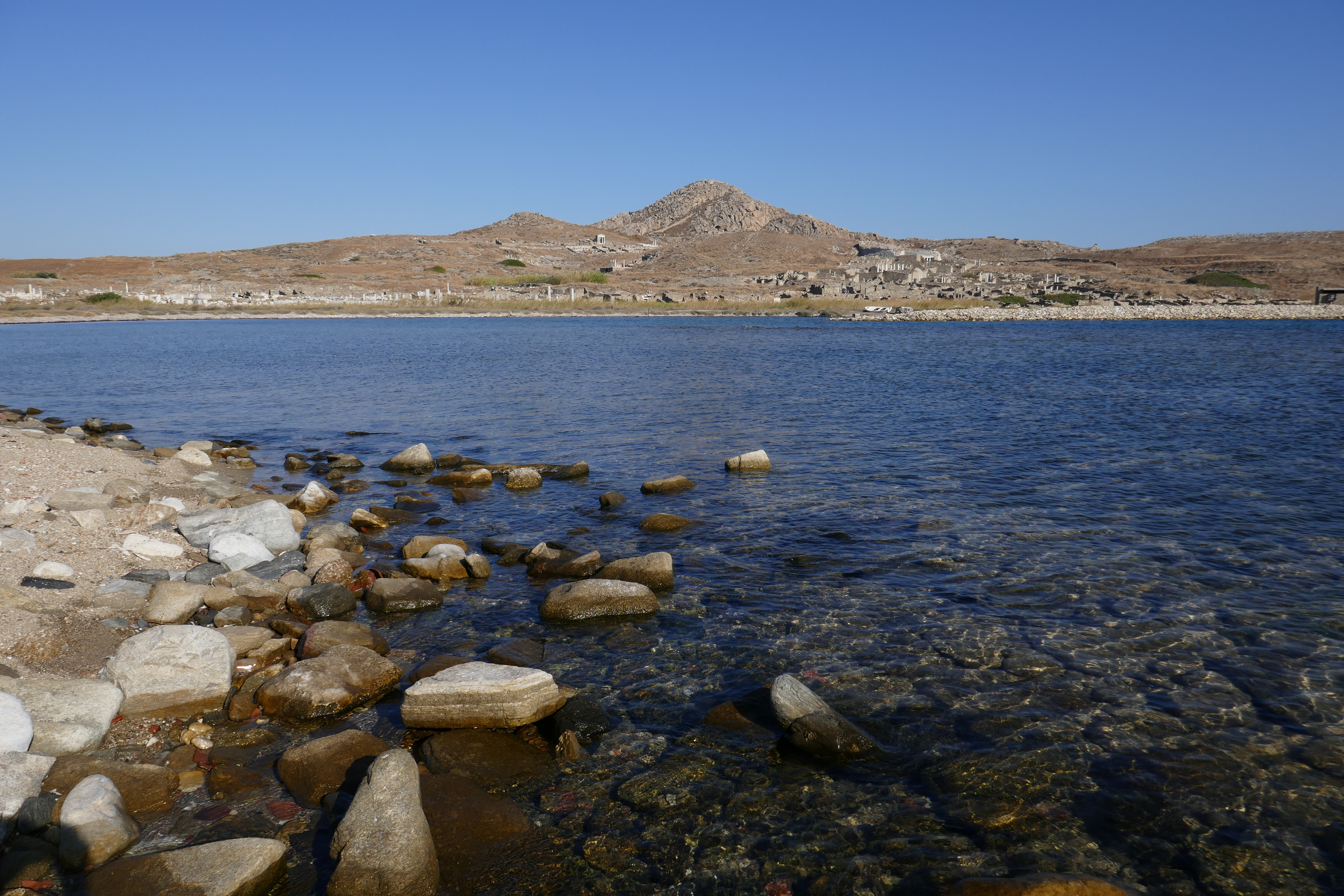 キュントス山